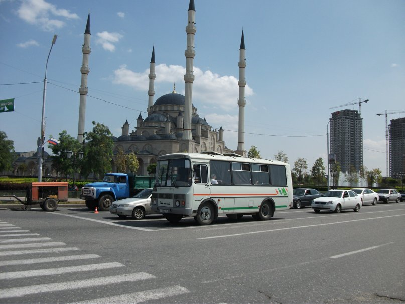 Проспект Путина